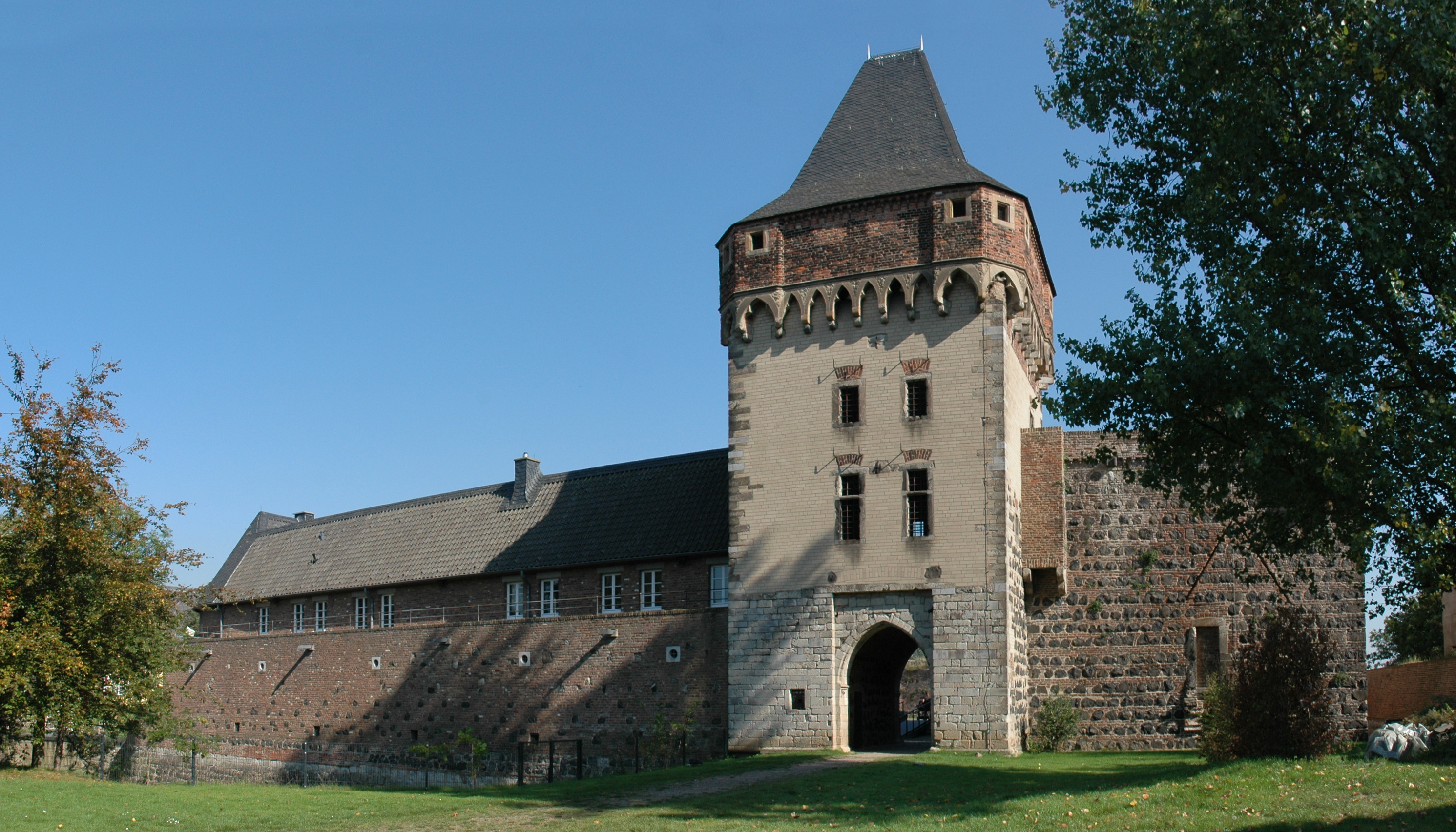 Burg Friedestrom in Dormagen-Zons, Westseite der Kernburg This image was created with Hugin.